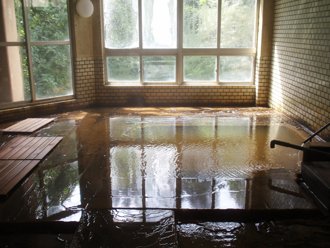 秋田県矢立温泉浴室